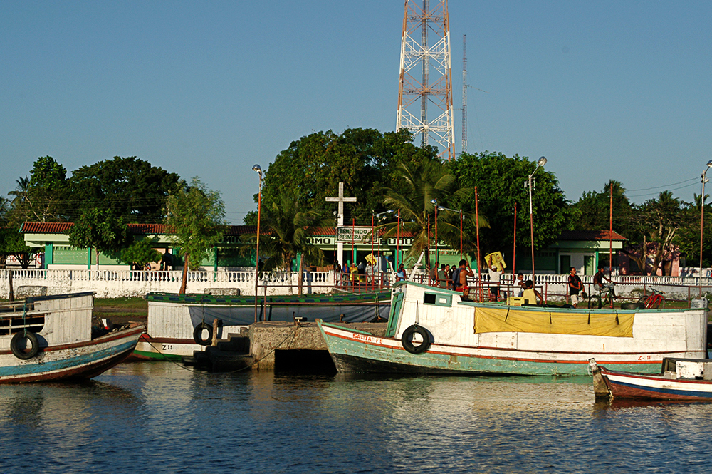 Barcos ancorados no porto de Primeira Cruz no estado do Maranhão.